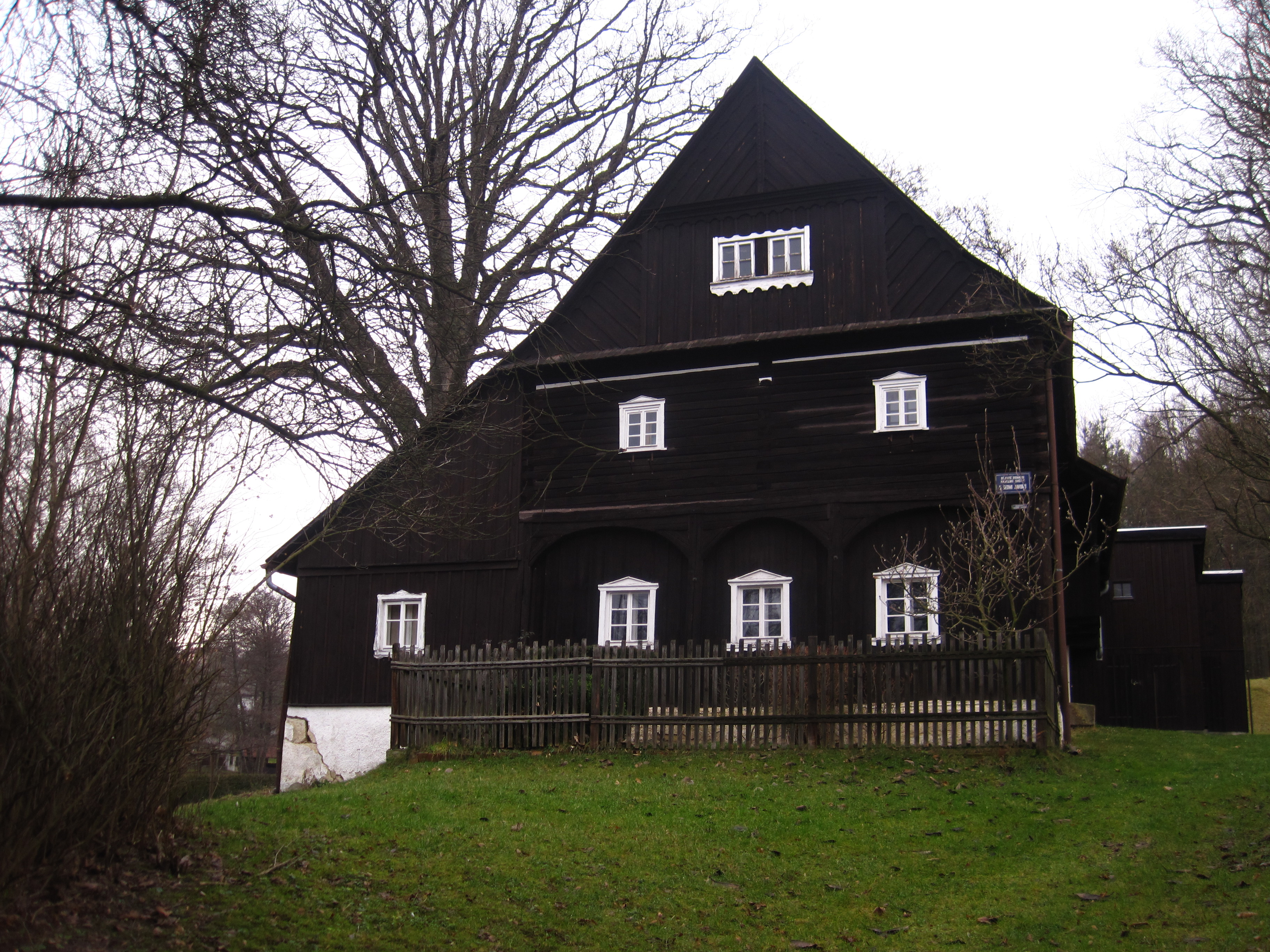 Dům čp. 4, Rozstání 4, Rozstání (Světlá pod Ještědem).